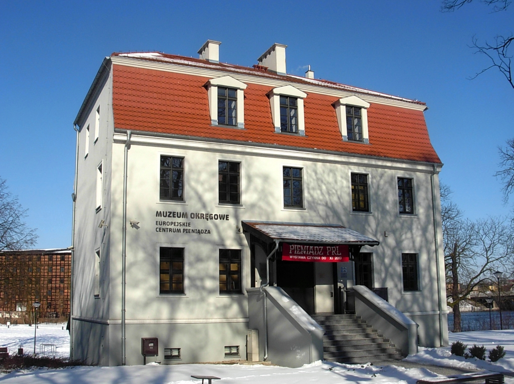 Europejskie Centrum Pieniądza na Wyspie Młyńskiej